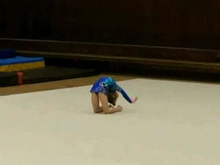 Juvanile gymnast